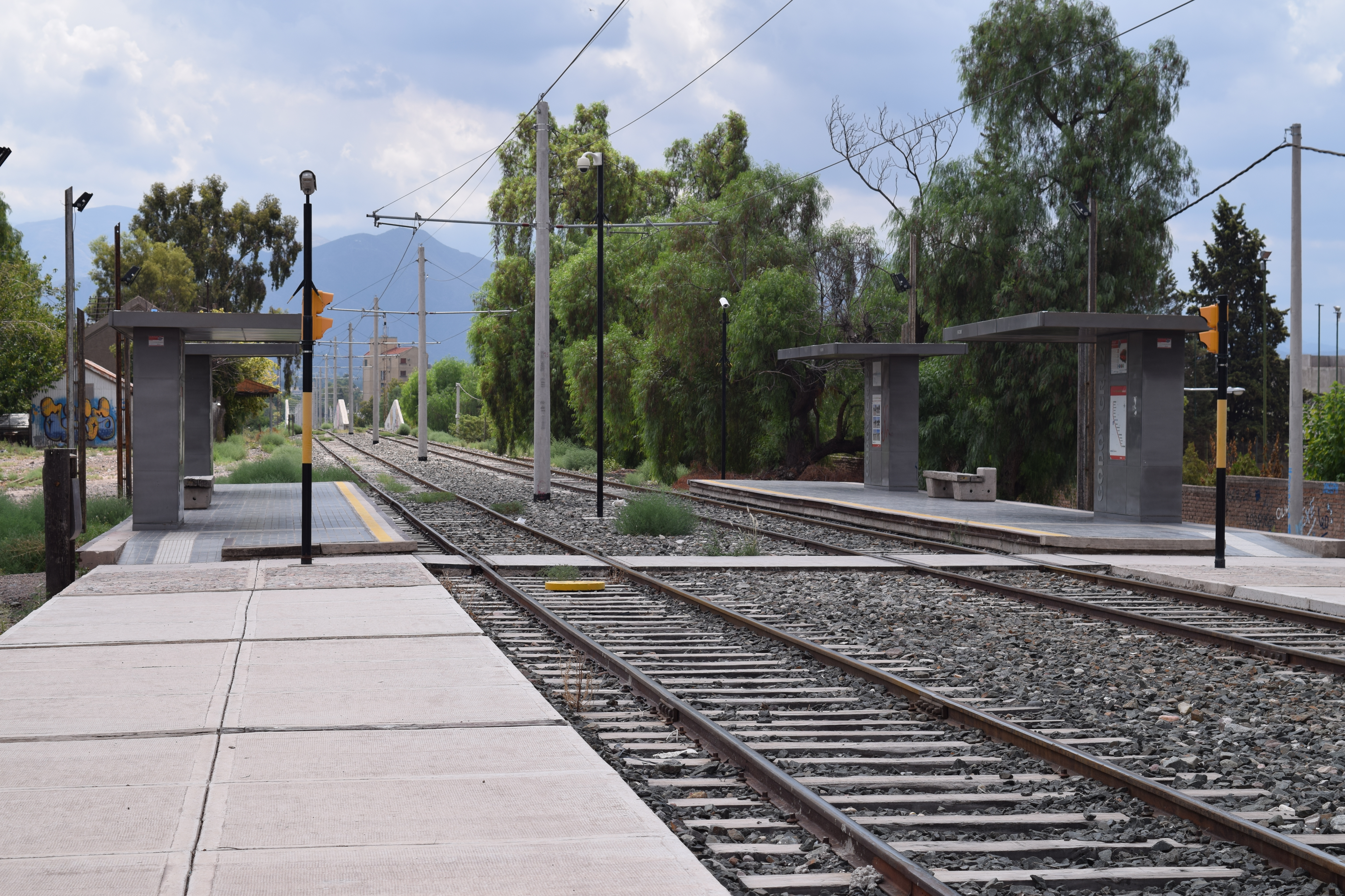 Vista del Parador Godoy Cruz del Metrotranvía de Mendoza.